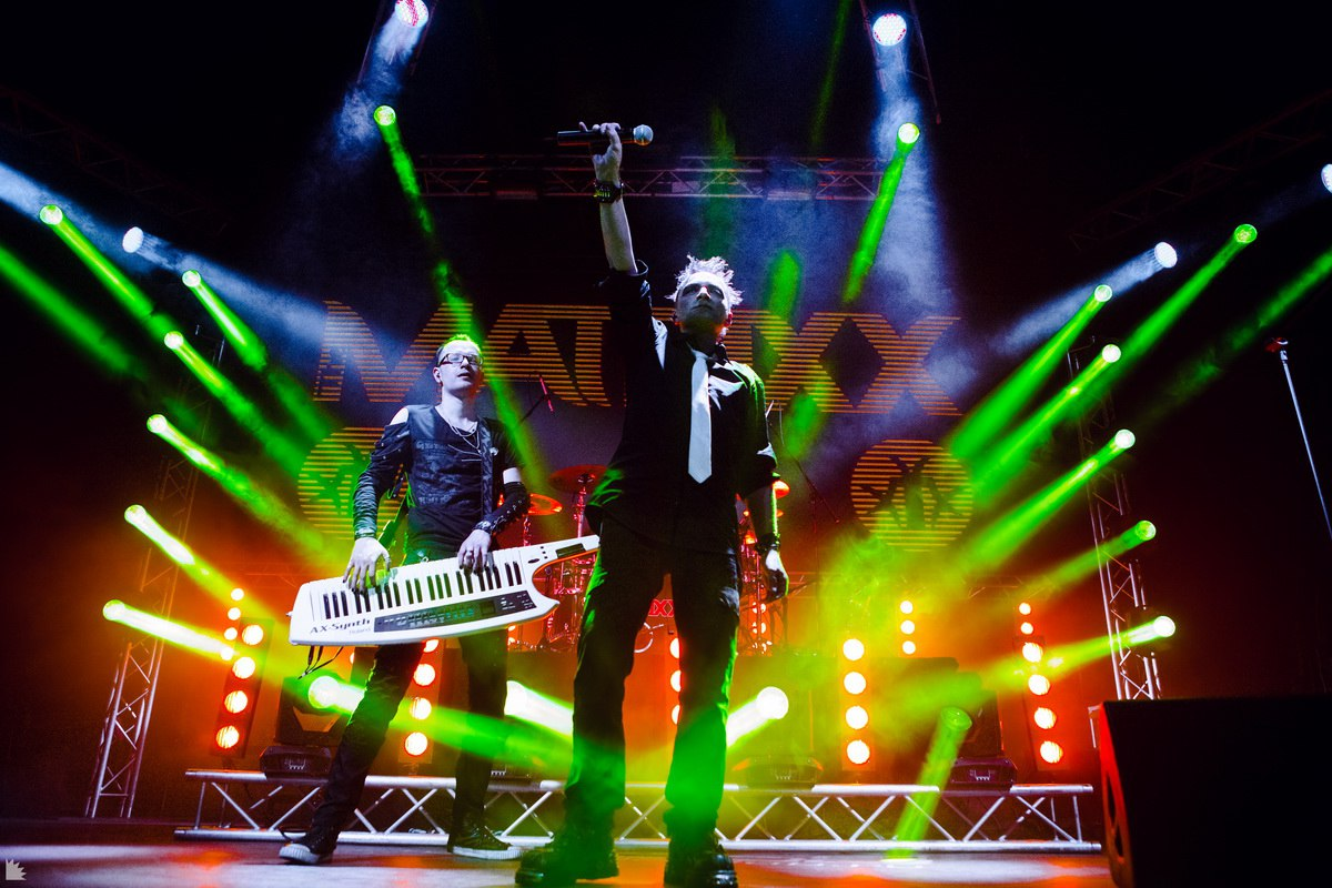 Глеб Самойлоff & The MatriXX 10.10.2015